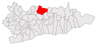 Categorie:Hărţi ale judeţului Călăraşi